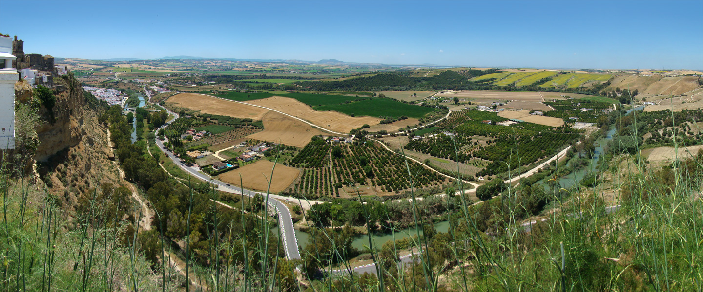 Balcón de Arcos, Arcos de la Frontera, Andalucía, España.